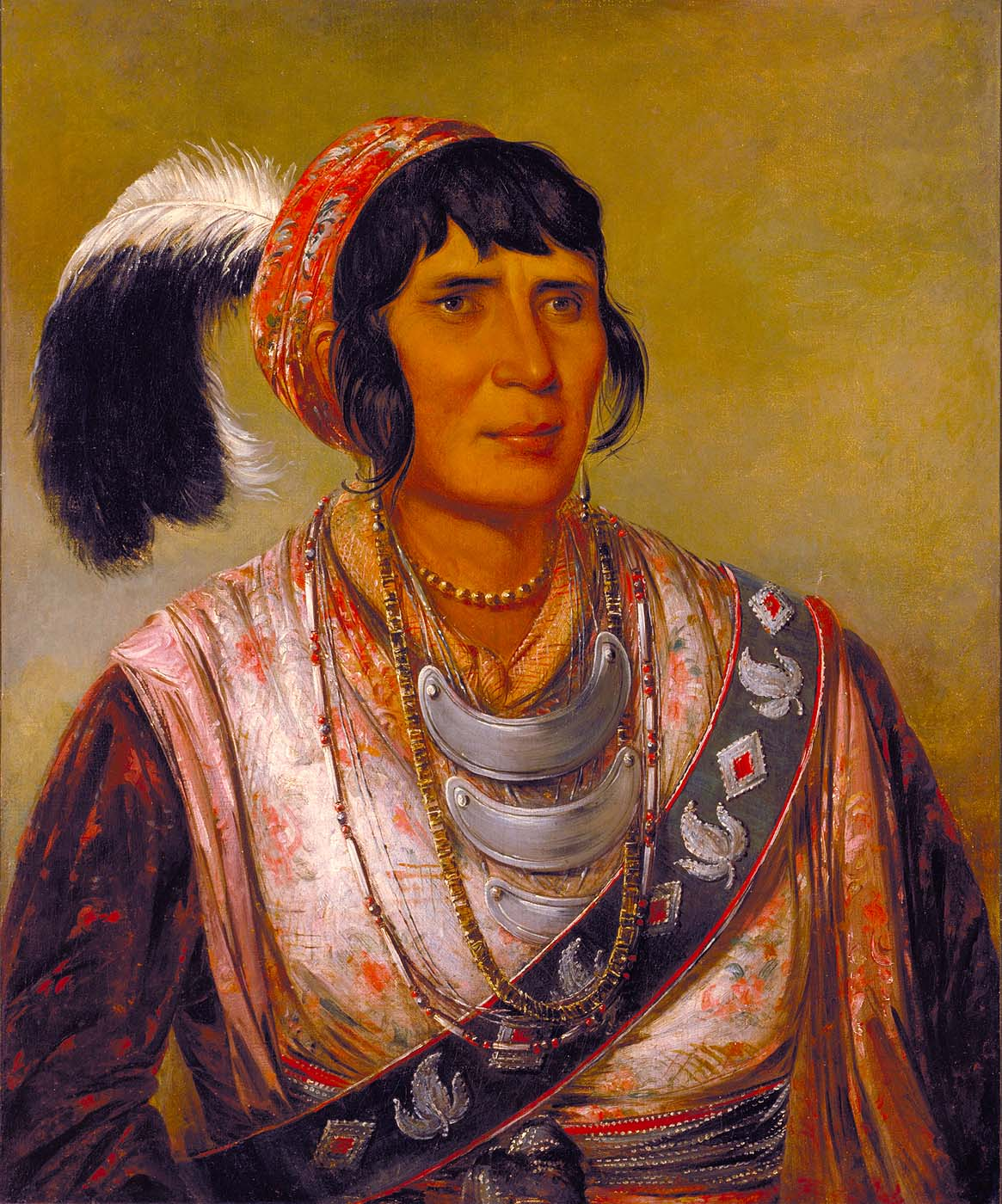 Seminole Chief Osceola (1804–1838)